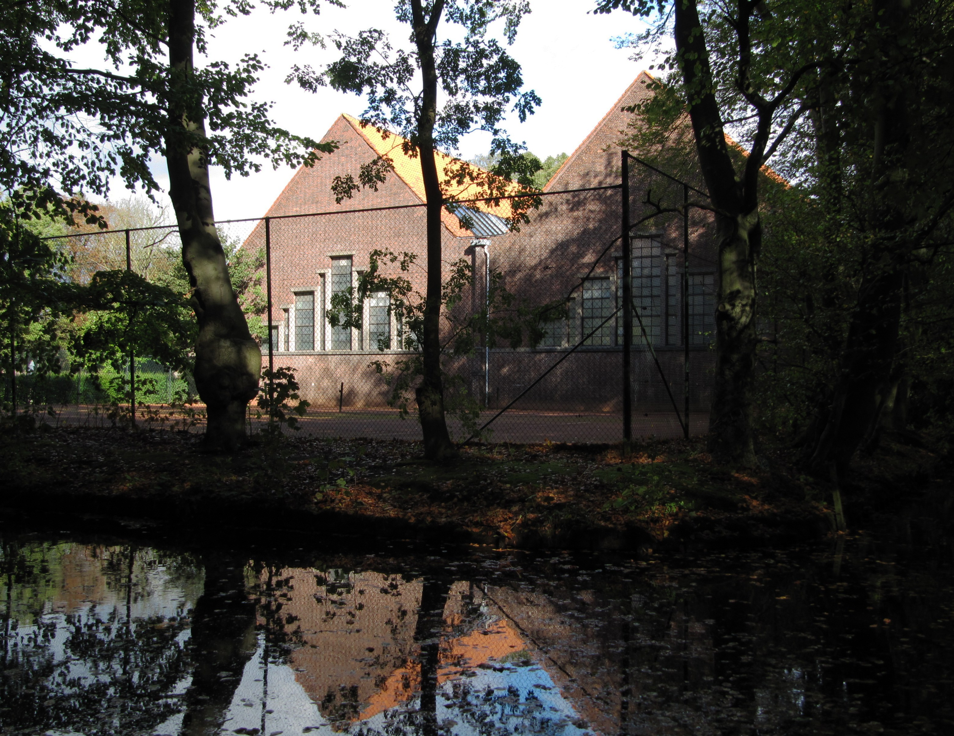 RM510699 Den Haag - Marlot - tennishal zijgevel.jpg